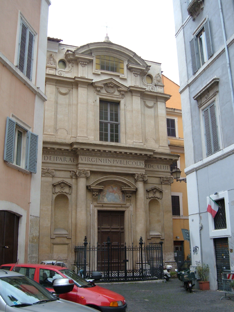 Chiesa di Santa Maria in Publicolis, a Roma, nel rione Sant'Eustachio. Foto personale.